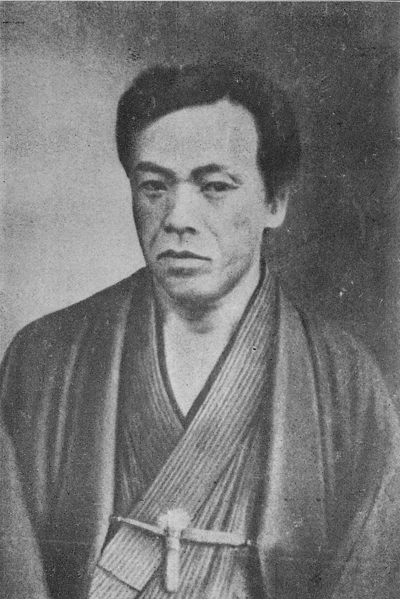 江藤新平の肖像